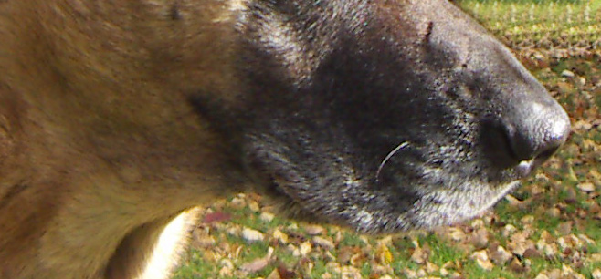 Nase hund. Eigen foto Steffen Heinz (caronna)